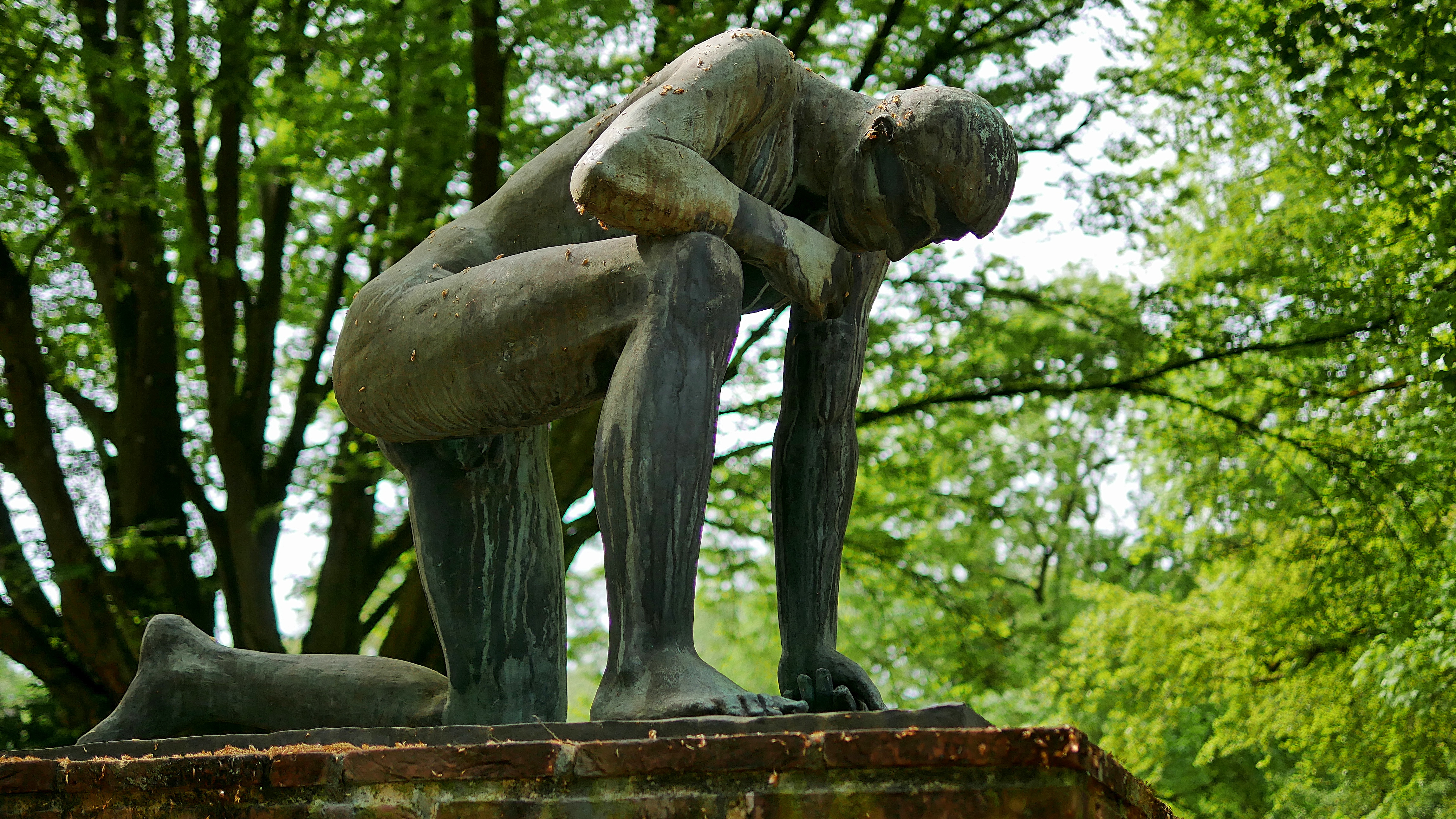 Denkmal für die Opfer der Gewaltherrschaft, 1950 geschaffen vom Trierer Bildhauer Michael Trierweiler. Hauptfriedhof Trier (in der Nähe des jüdischen Friedhofs und der neuen Aussegnungshalle)